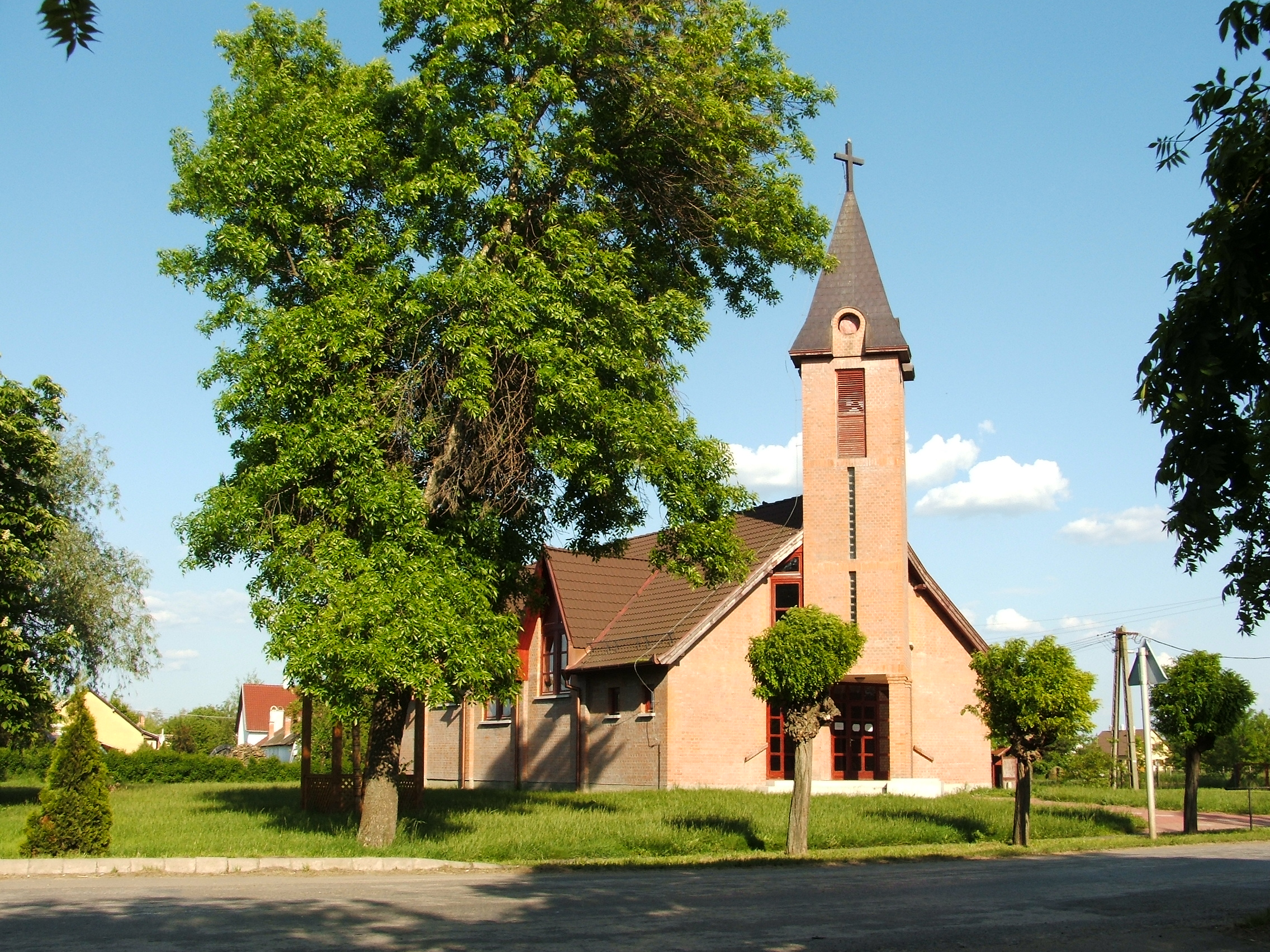 Eperjesi (Csongrád County, Hungary) Szent László római katolikus temploma